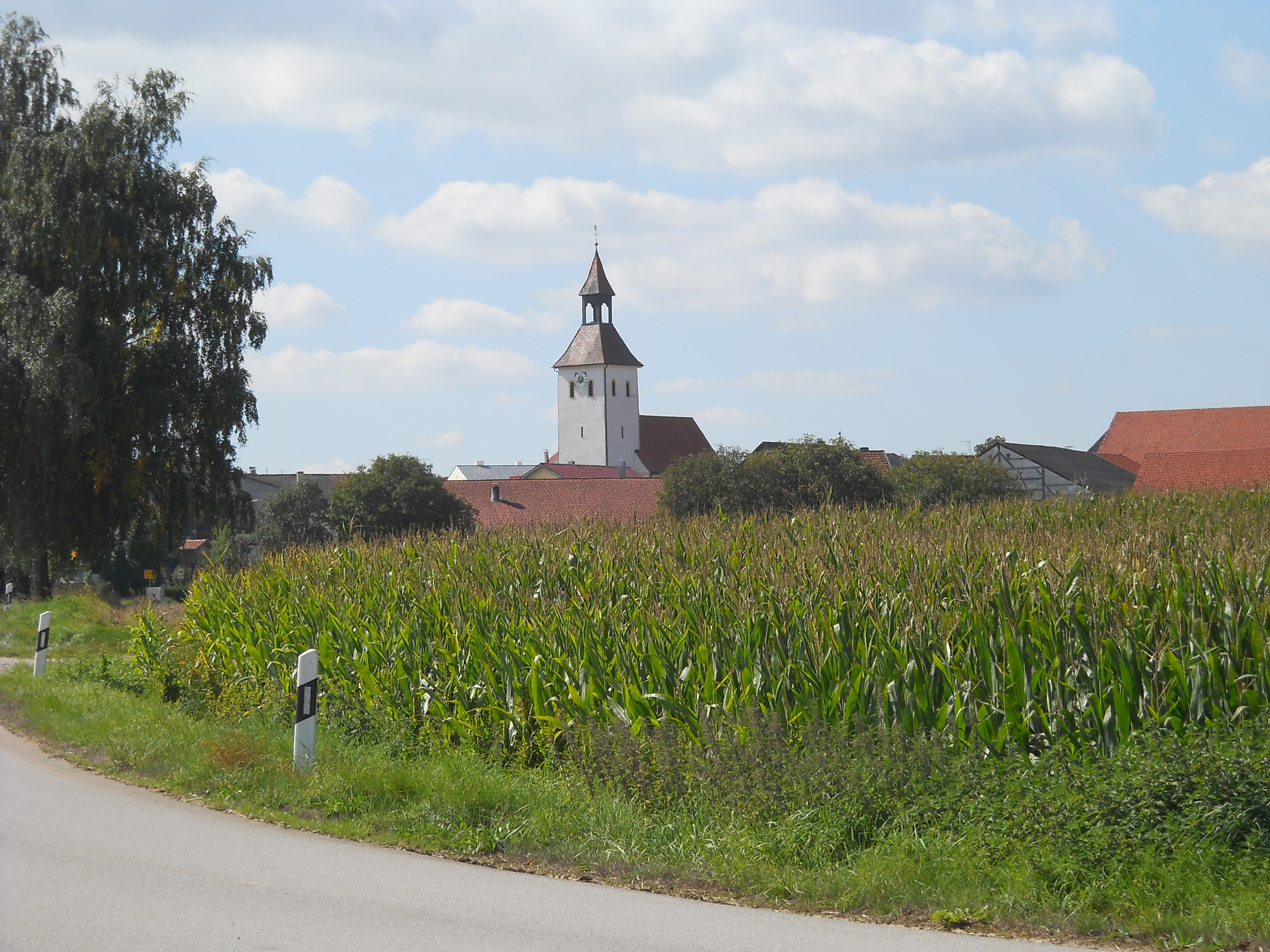 Petersbuch, Ortsteil der Gemeinde Titting im Landkreis Eichstätt